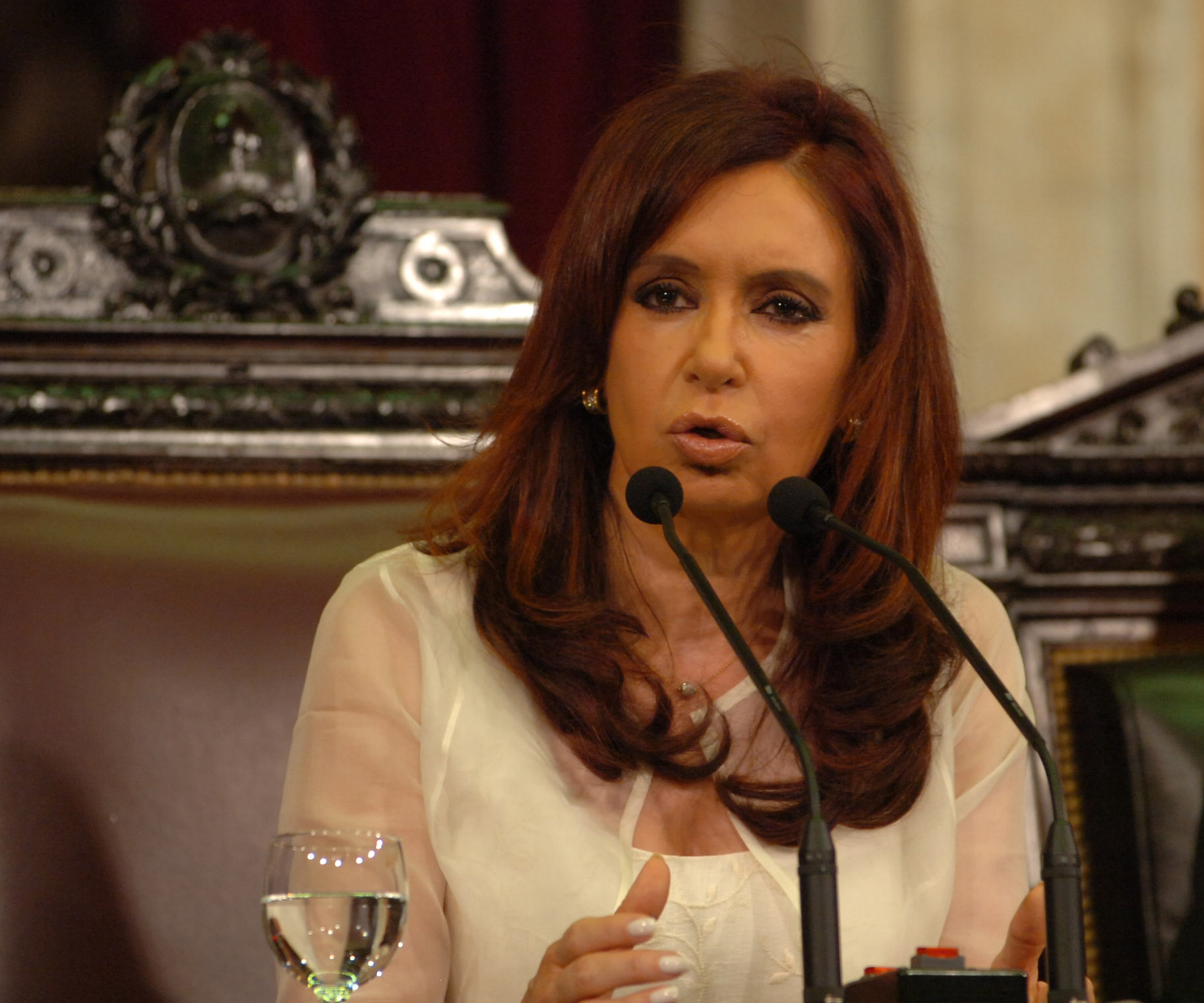 La presidenta Cristina Fernández brindó un dicurso ante la Asamblea Legislativa.